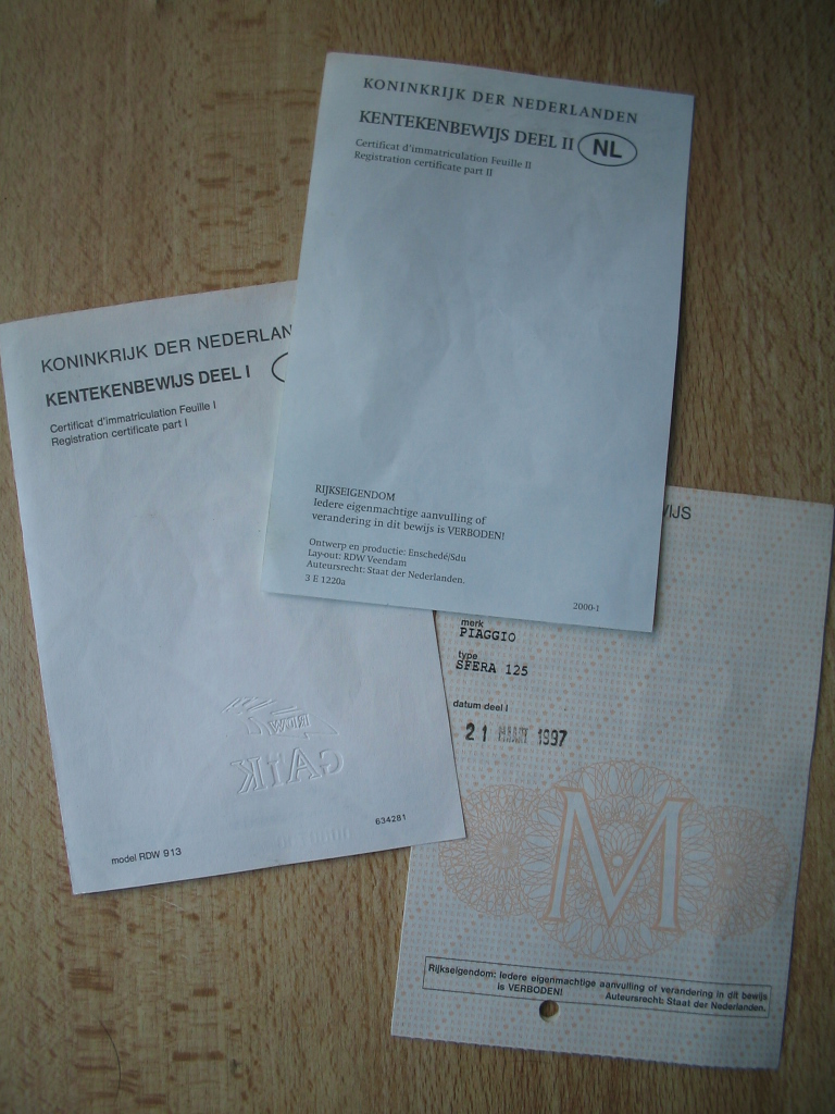 Nederlands kentekenbewijs (3 delen) van een Piaggio Sfera motorscooter.